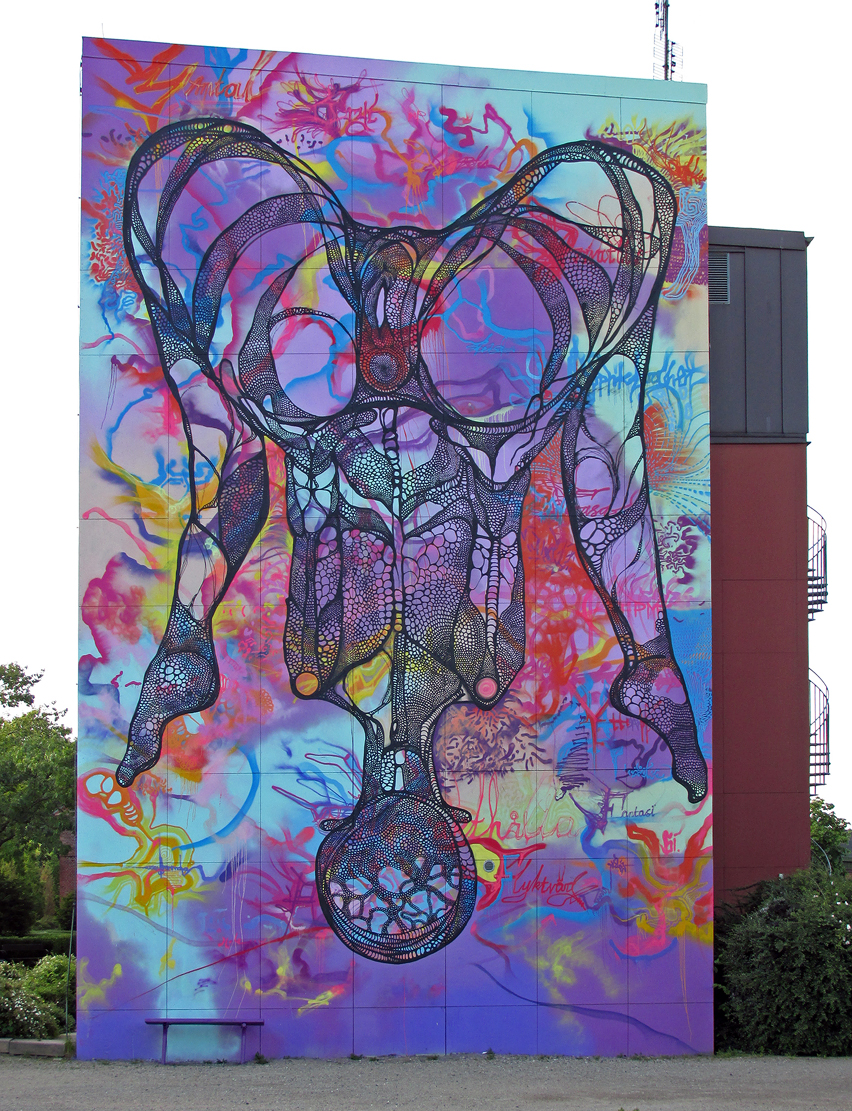 En väggmålning utförd på Parkskolan i Ystad 2015.